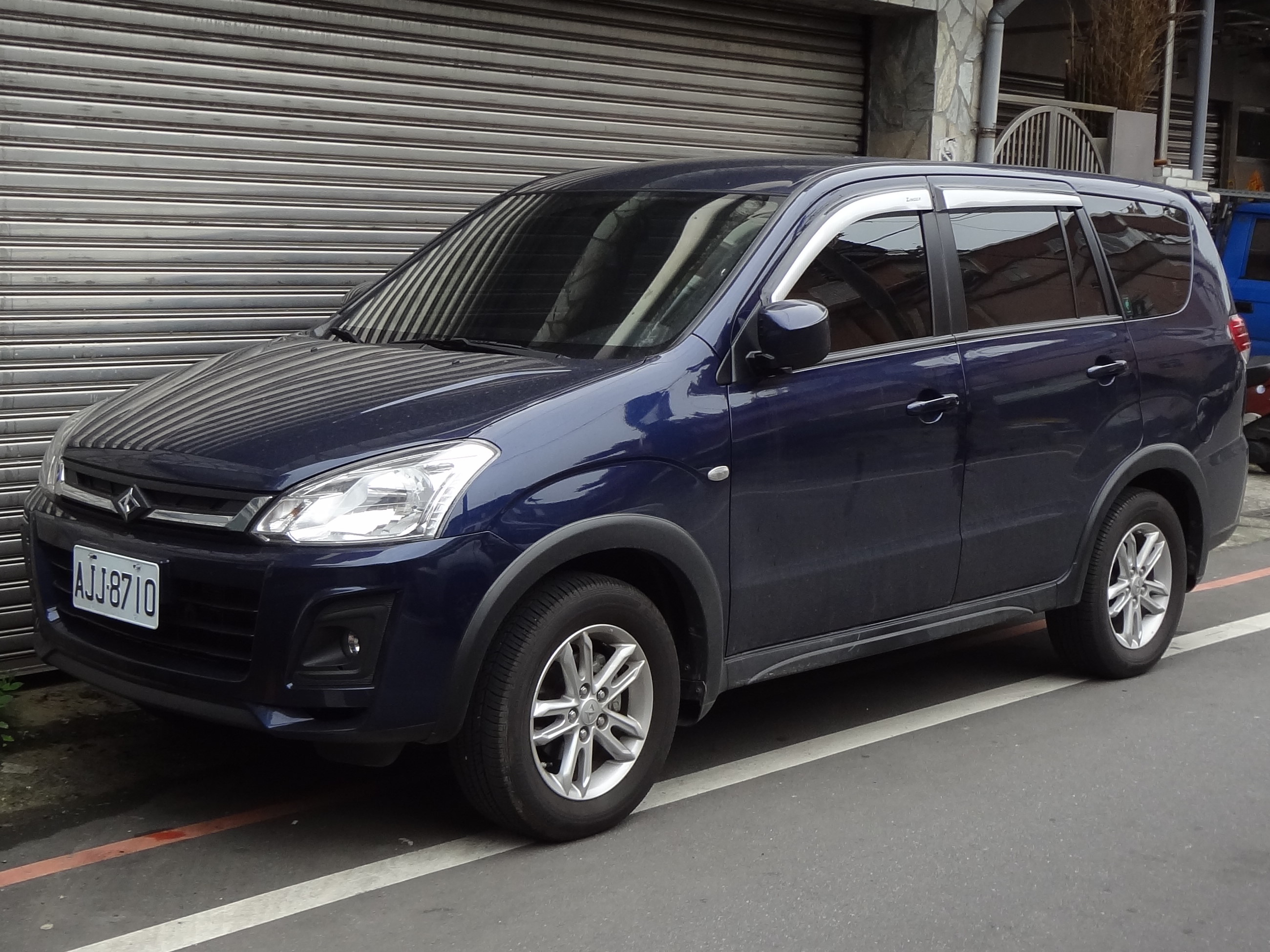 中華雙贏AJJ-8710。